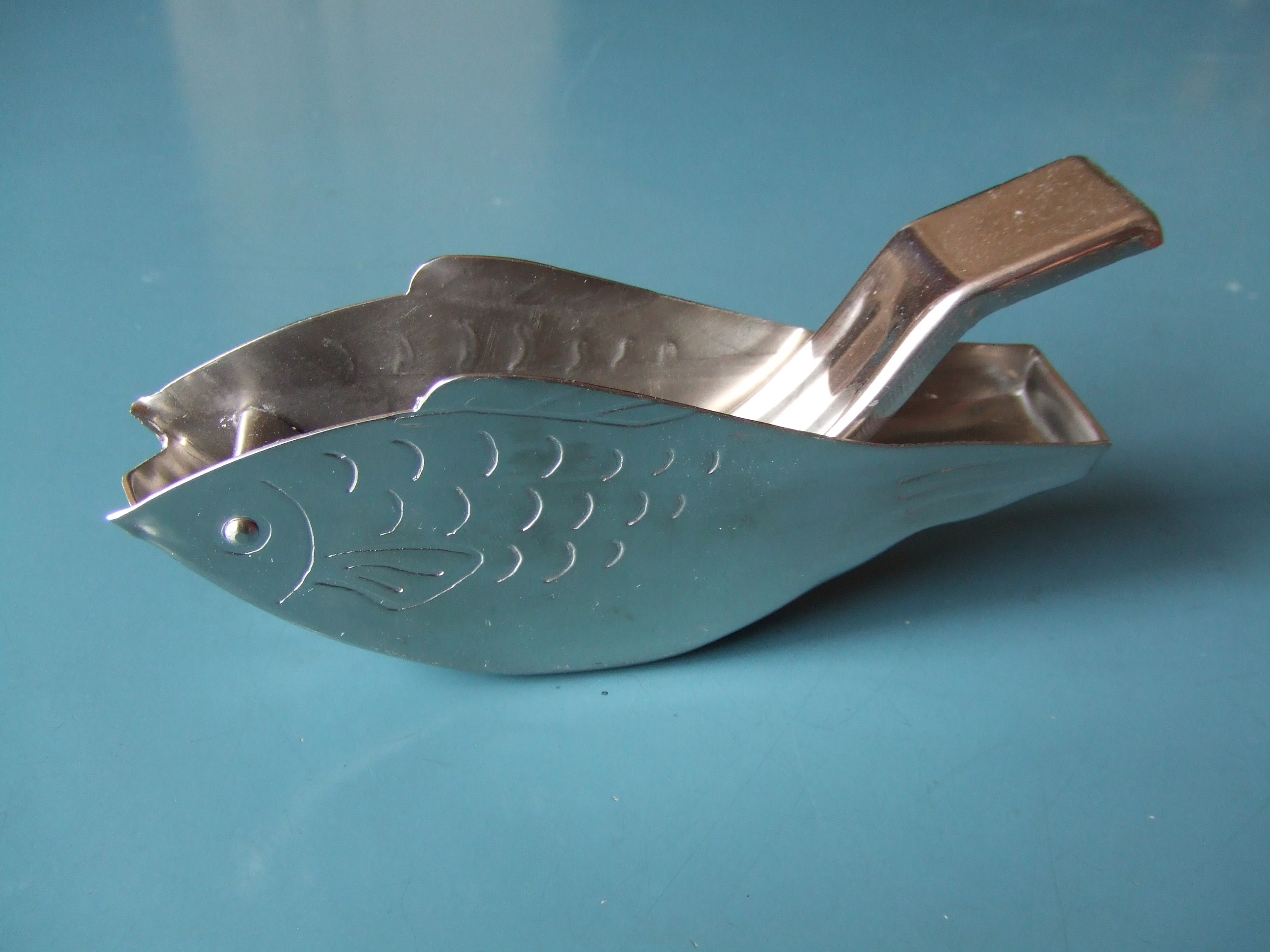 fish shape lemonsqueezer